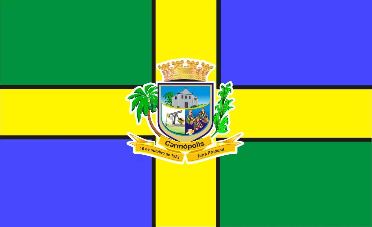 Bandeira do município de Carmópolis-SE